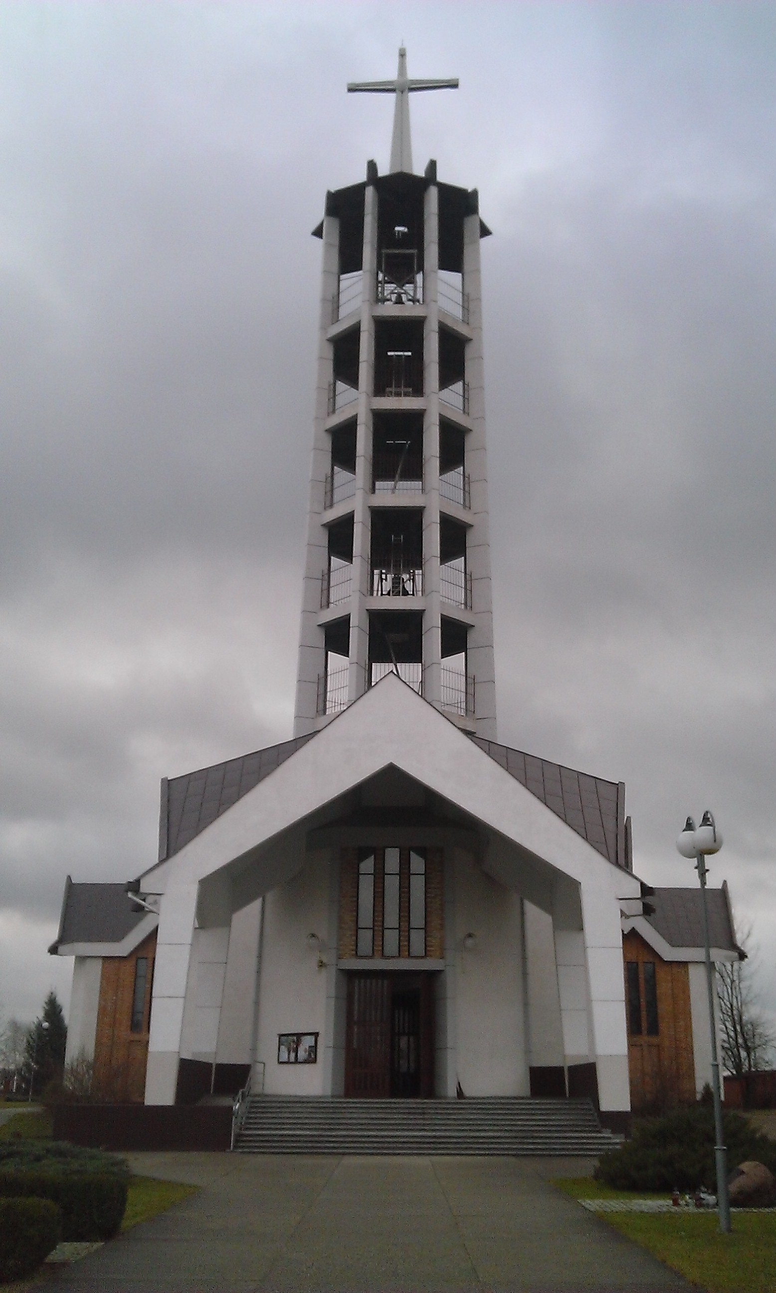 Jasienica (gm. Tłuszcz, pow. Wołomin) - kościół Narodzenia Pańskiego